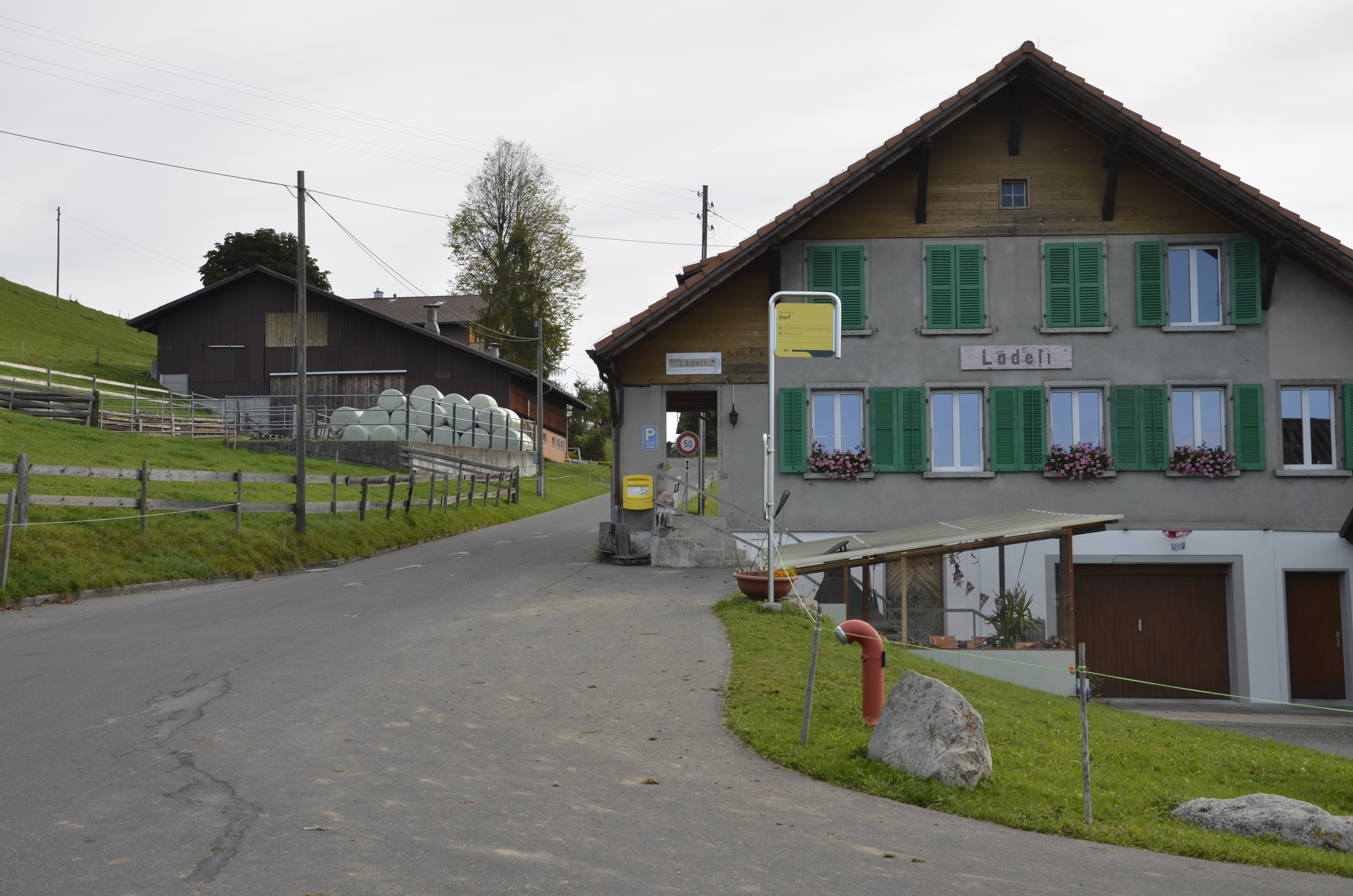 Kanton Bern (Schweiz): Gemeinde Wachseldorn, Haltestelle Dorf